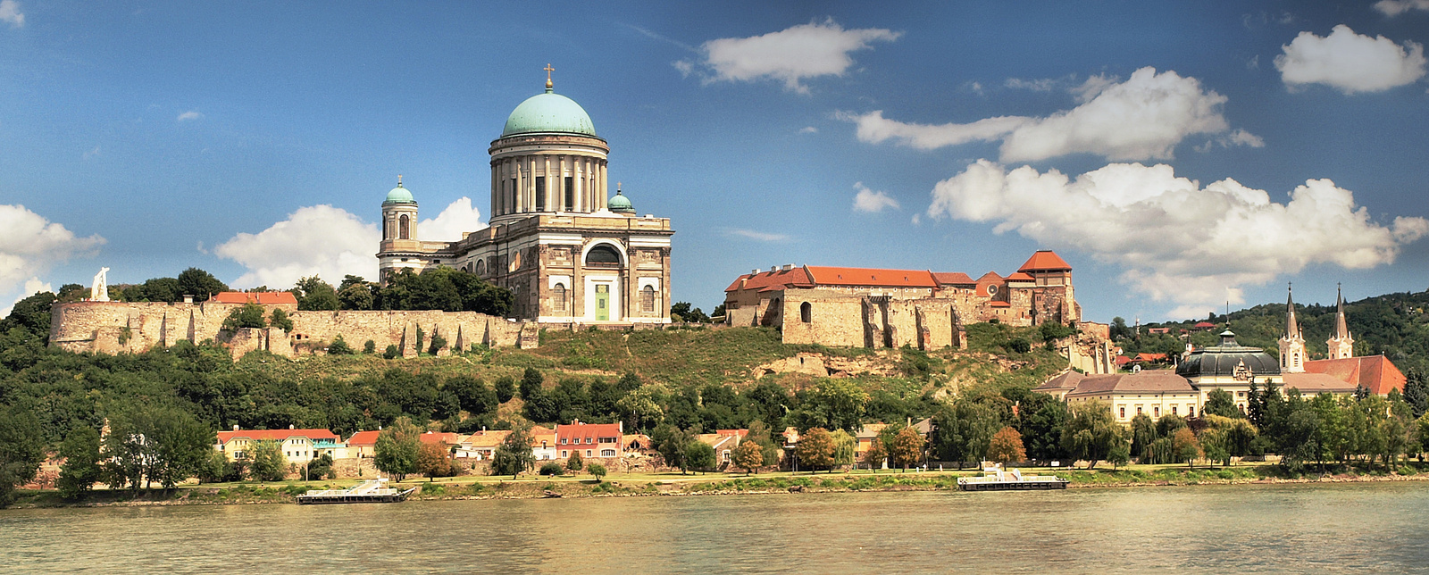 Főszékesegyház (Esztergom, Szent István tér) This is a photo of a monument in Hungary. Identifier: 6238